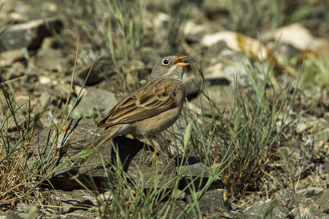 Gray-hooded Bunting - Kazakistan_S4E2689